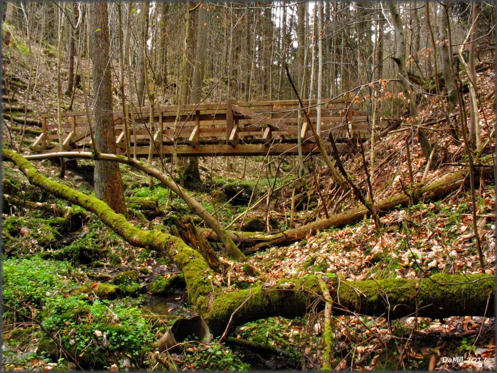 PP Na Kutinách. Suťová rokle malého toku s přirozenými porosty